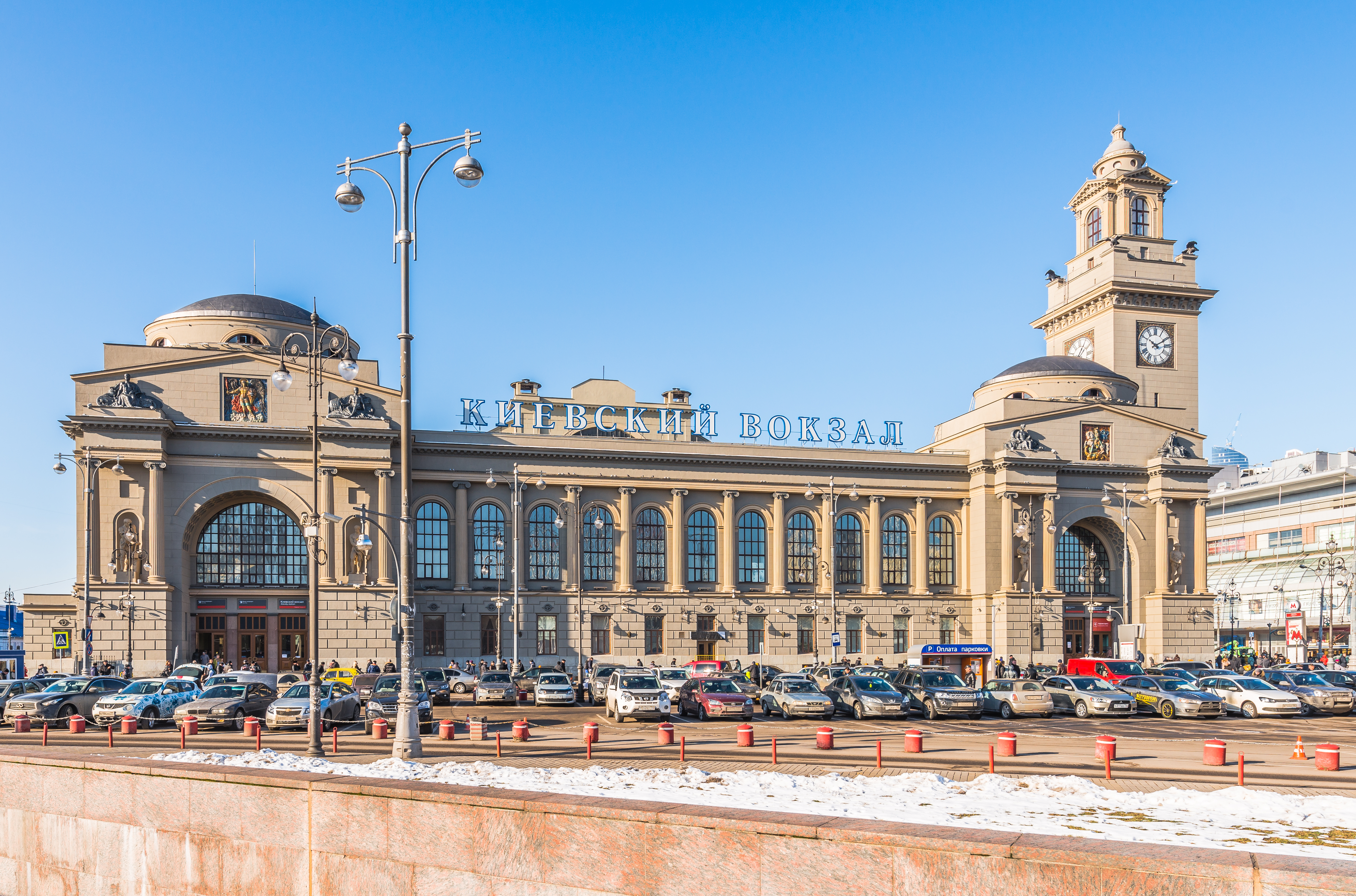 Киевский вокзал: Киевского Вокзала пл., дом 1, Дорогомилово, Западный округ, Москва